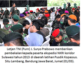 saran saran